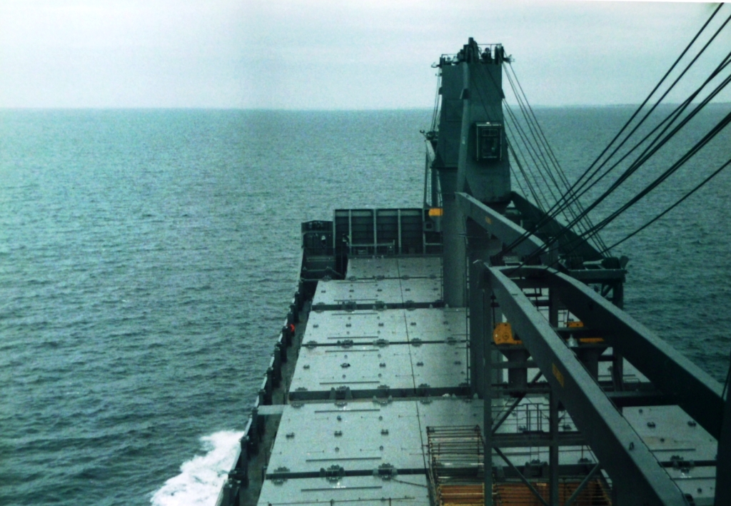 Das Schiff der Zukunft Norasia Samantha (Prototyp) auf der Probefahrt